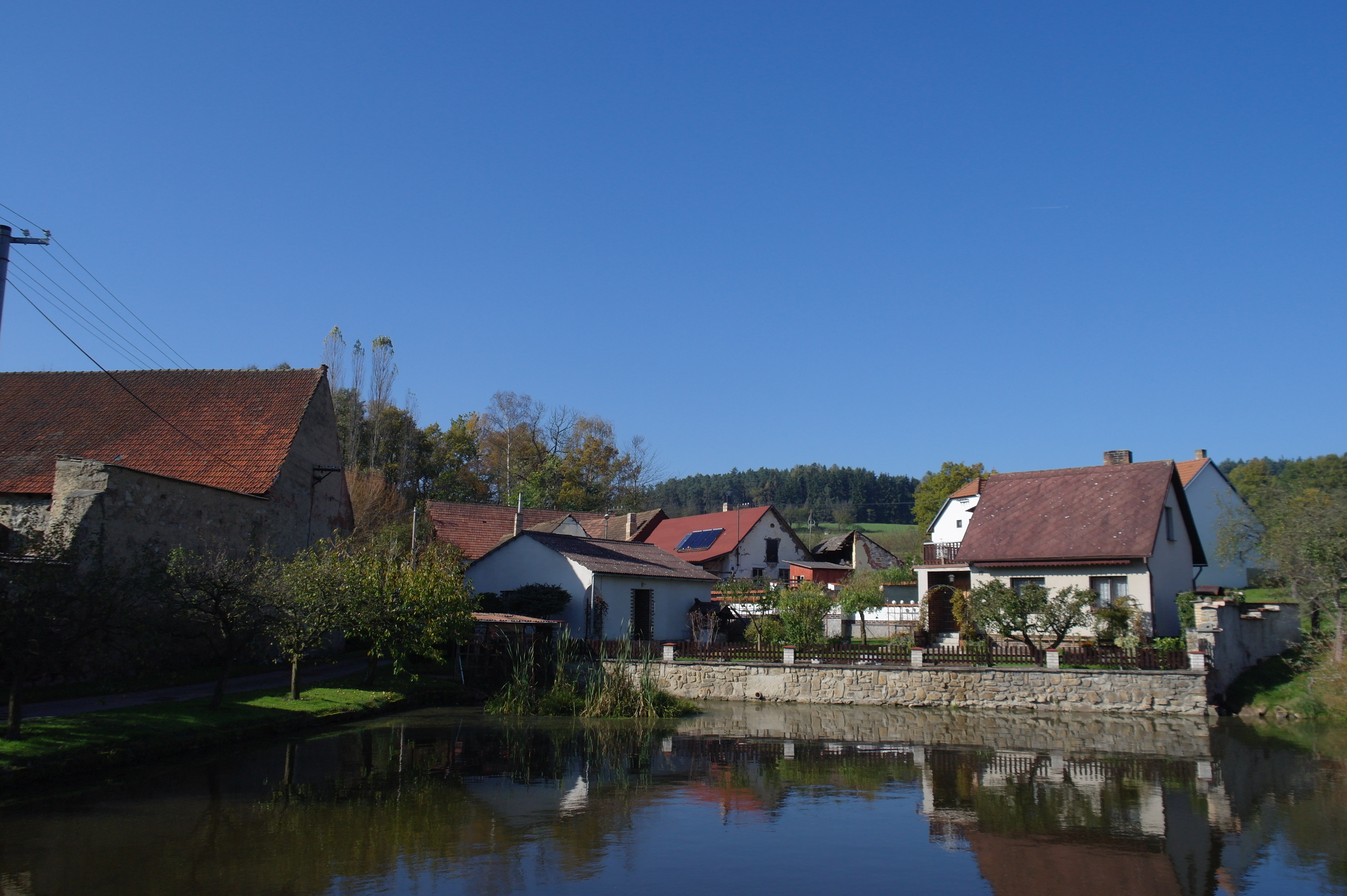 Rybník v centrální části Tourova